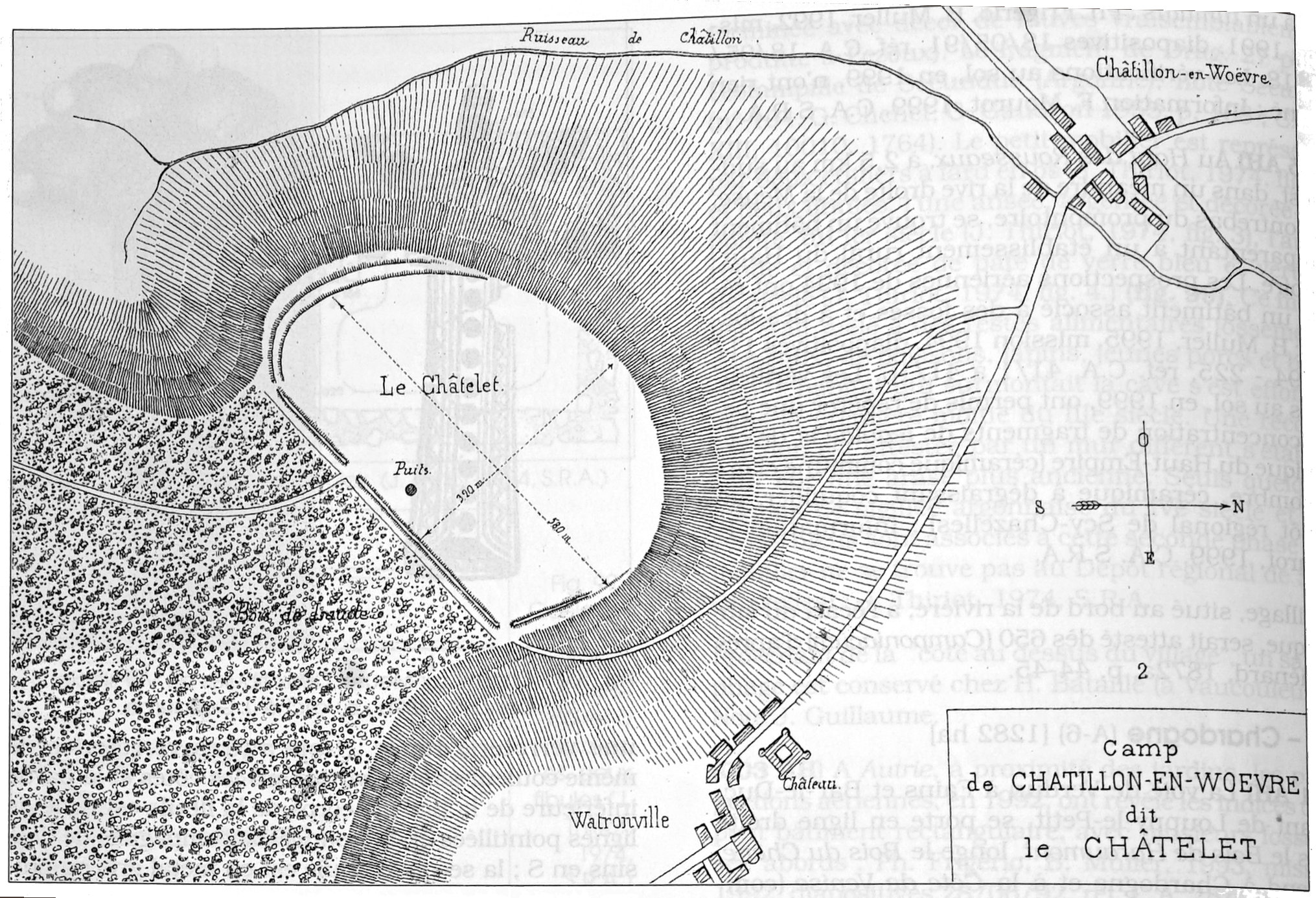 représentation de cf. titre.